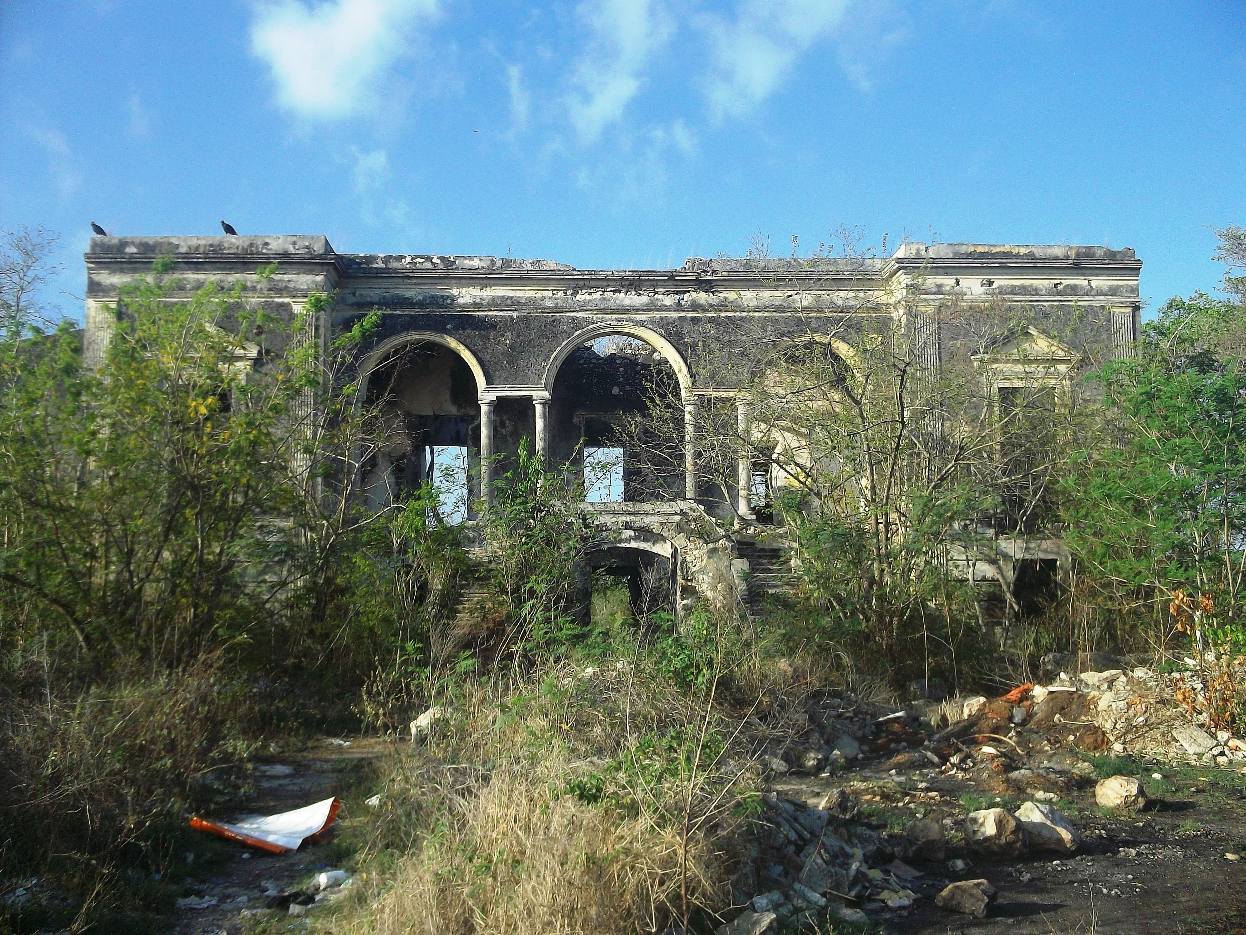 Hacienda Sitpach (Municipio de Mérida), Yucatán.